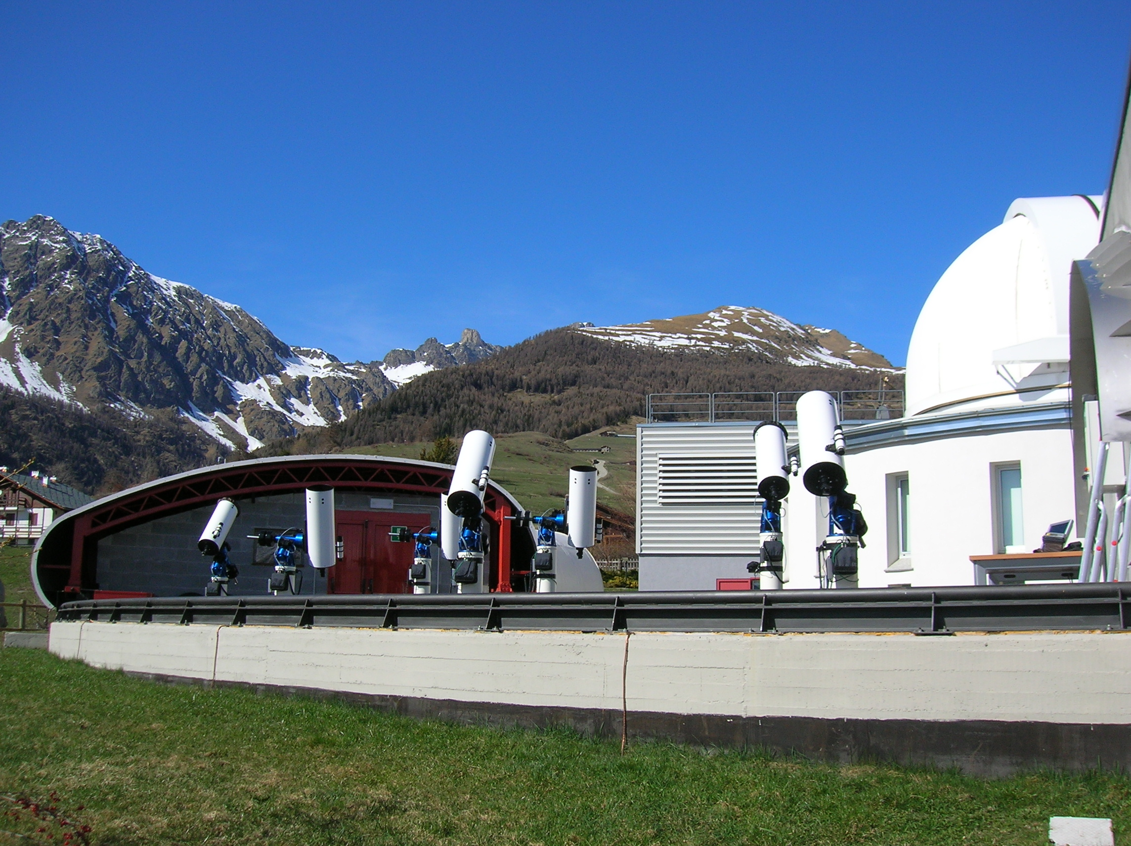 Osservatorio astronomico Fondation Clément Fillietroz: osservatorio astronomico e planetario di Saint-Barthélemy, presso la località Lignan, comune di Nus, Valle d'Aosta, Italia. E' l'Osservatorio astronomico della Regione Autonoma Valle d'Aosta.